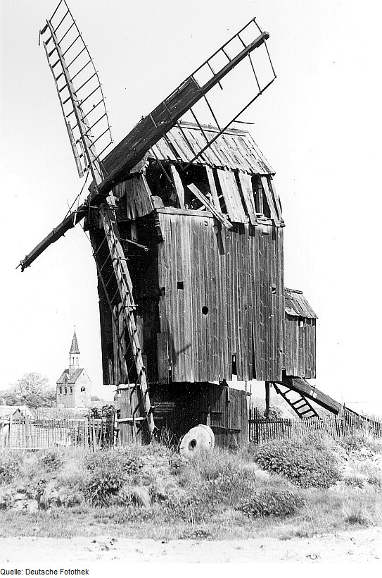 Original image description from the Deutsche Fotothek Jeetze. Bockmühle, erbaut um 1834